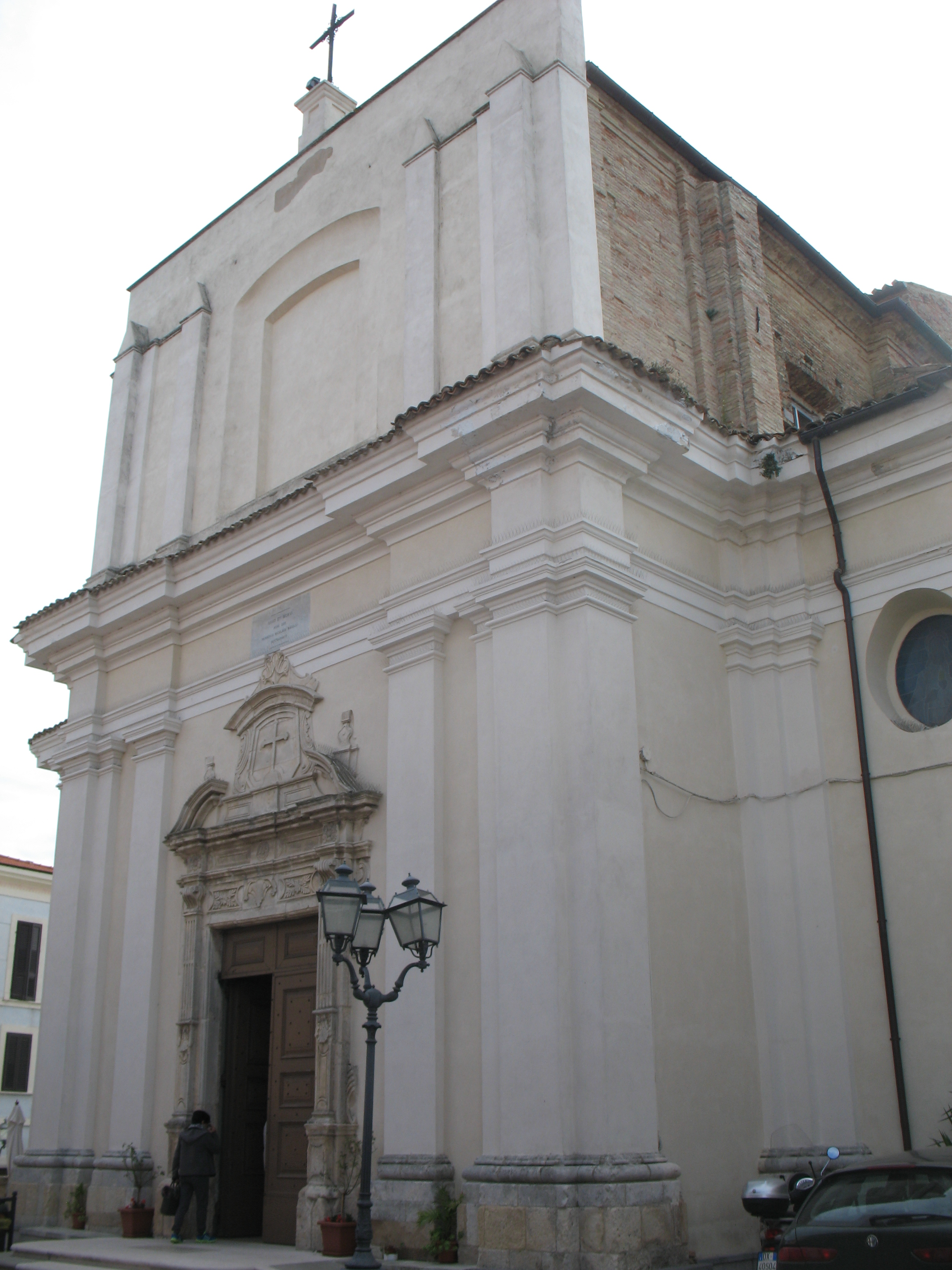 La facciata della settecentesca chiesa di Santa Maria Maggiore a Villamagna (CH)